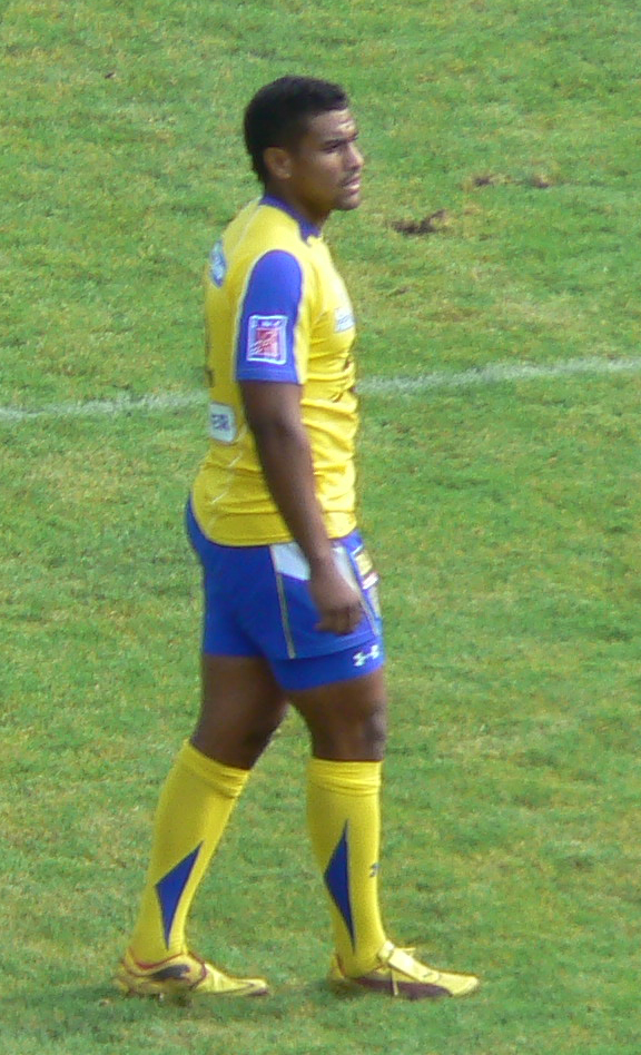 Le rugbyman français Wesley Fofana avec l'ASM Clermont Auvergne affronte le CA Brive au stade Marcel-Michelin de Clermont-Ferrand.